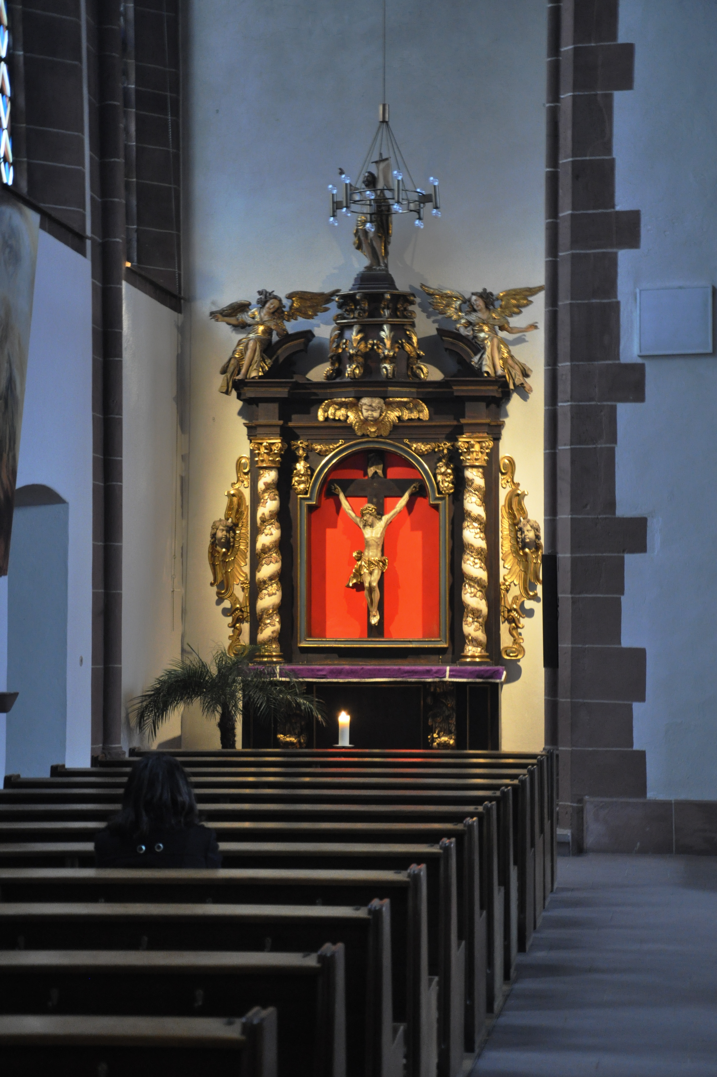 Frankfurt am Main, Liebfrauenkirche, Kreuzalatar, 2. Hälfte 17. Jh.; mit Kruzifix (evtl. aus der Werkstatt des Zacharias Junckers, Miltenberg, 1670)